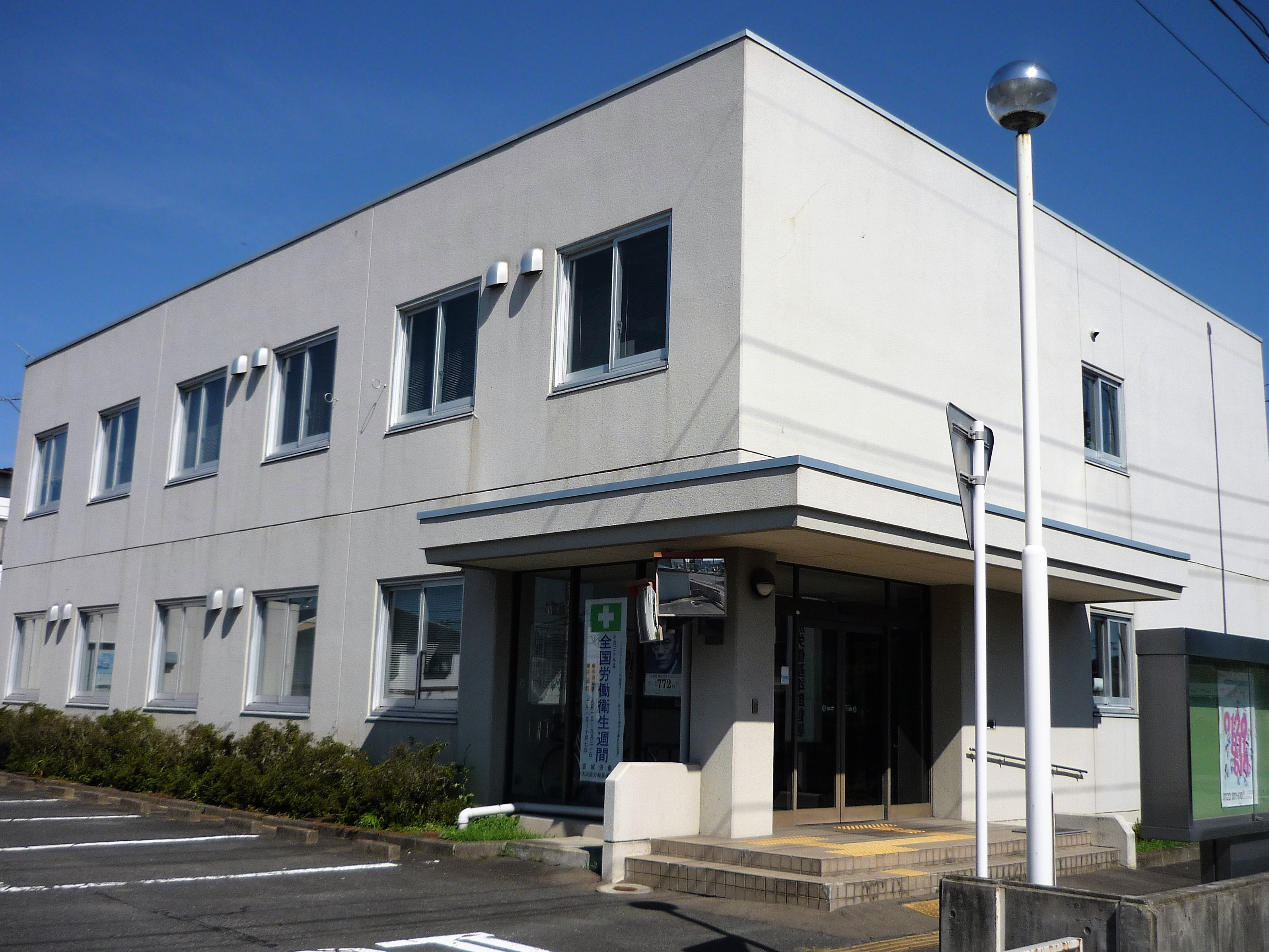 大河原労働基準監督署 Panasonic Lumix DMC-FS3